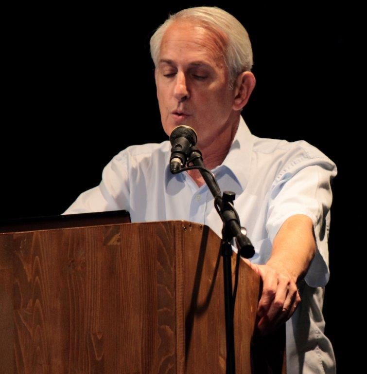 פרופ' אבי שגיא-שורץ